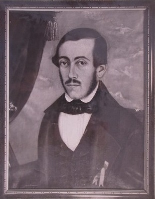 Fotografía del autorretrato de Benjamín Franklin Rawson.